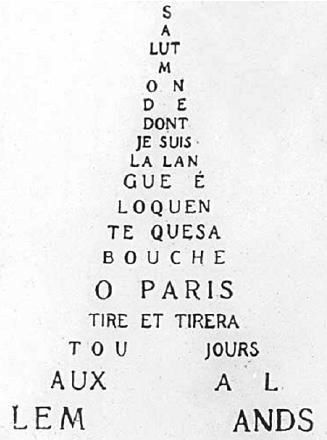 Calligramme de Guillaume Apollinaire (1880-1918) dont la forme évoque la tour Eiffel. « Salut monde dont je suis la langue éloquente que sa bouche Ô Paris tire et tirera toujours aux allemands »